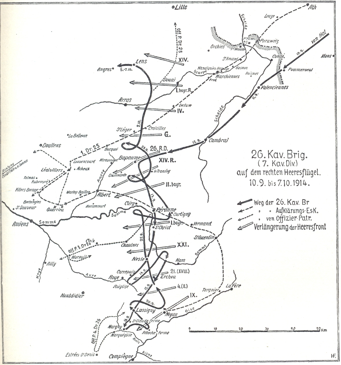 Karte Seite 25: 26. Kavallerie-Brigade 1914